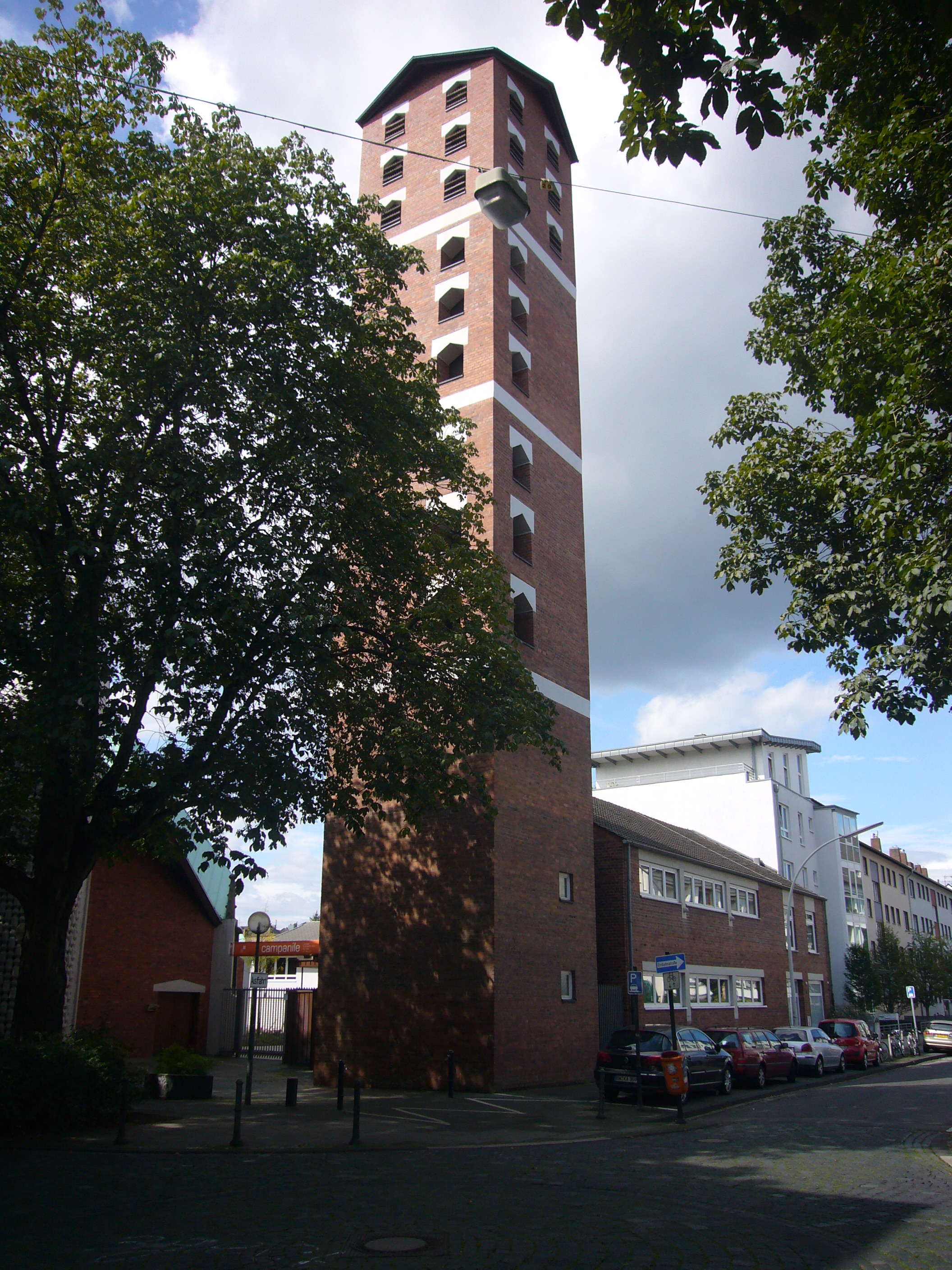 St. Franziskus-Kirche in Bonn (Adolfstraße 77 / Ecke Georgstraße), Ortsteil Nordstadt, Nr. A3152 der Bonner Denkmalliste. Hier: Glockenturm